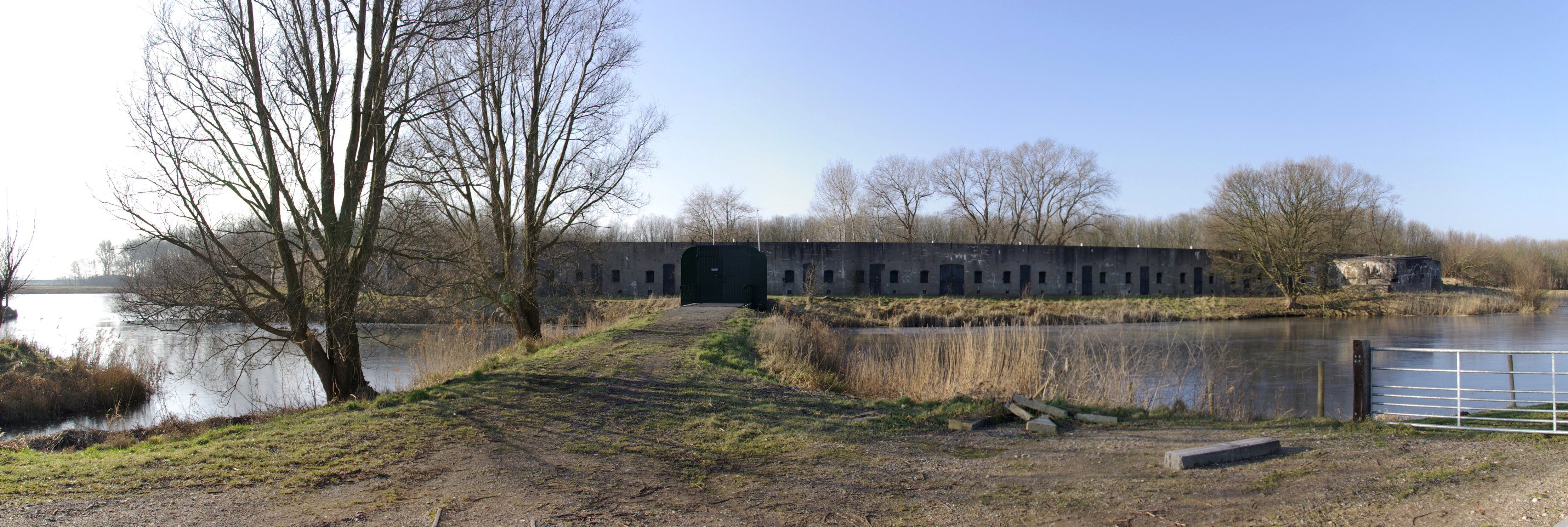 Stellung von Amsterdam: Fort nördlich von Spaarndam